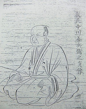 義民中川善兵衛之肖像